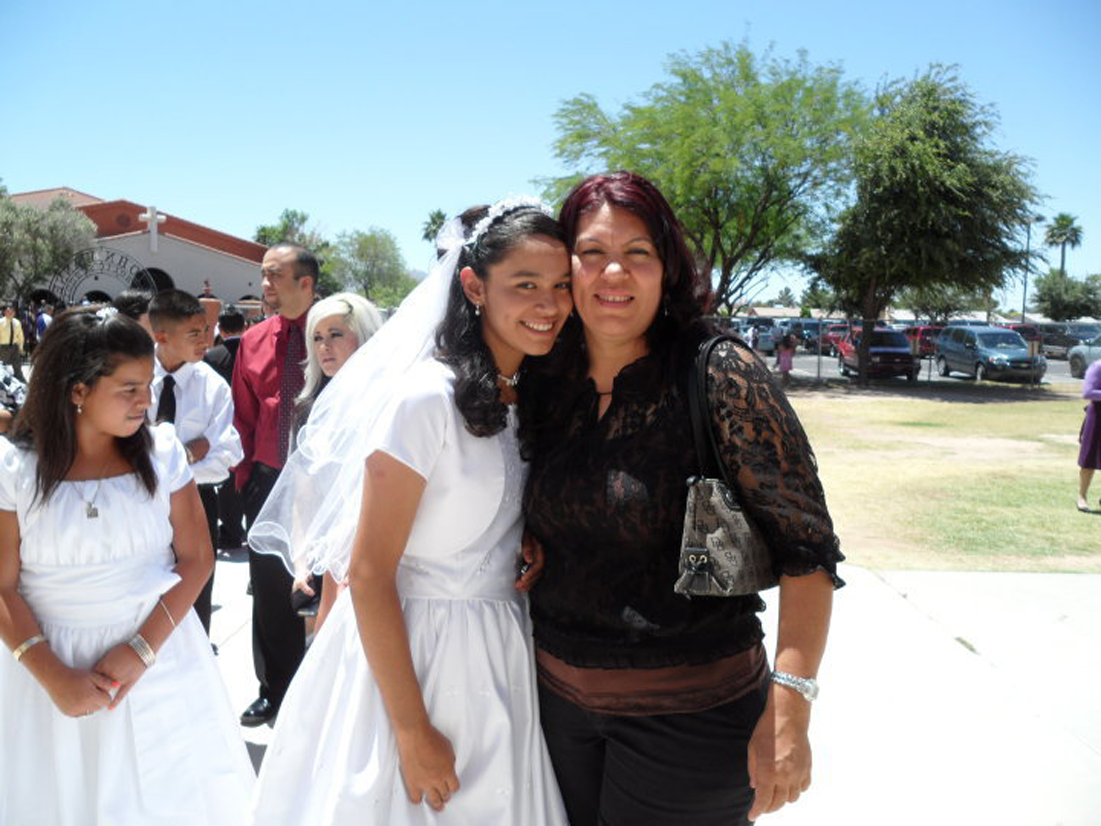 Foto del Ritual Tardío